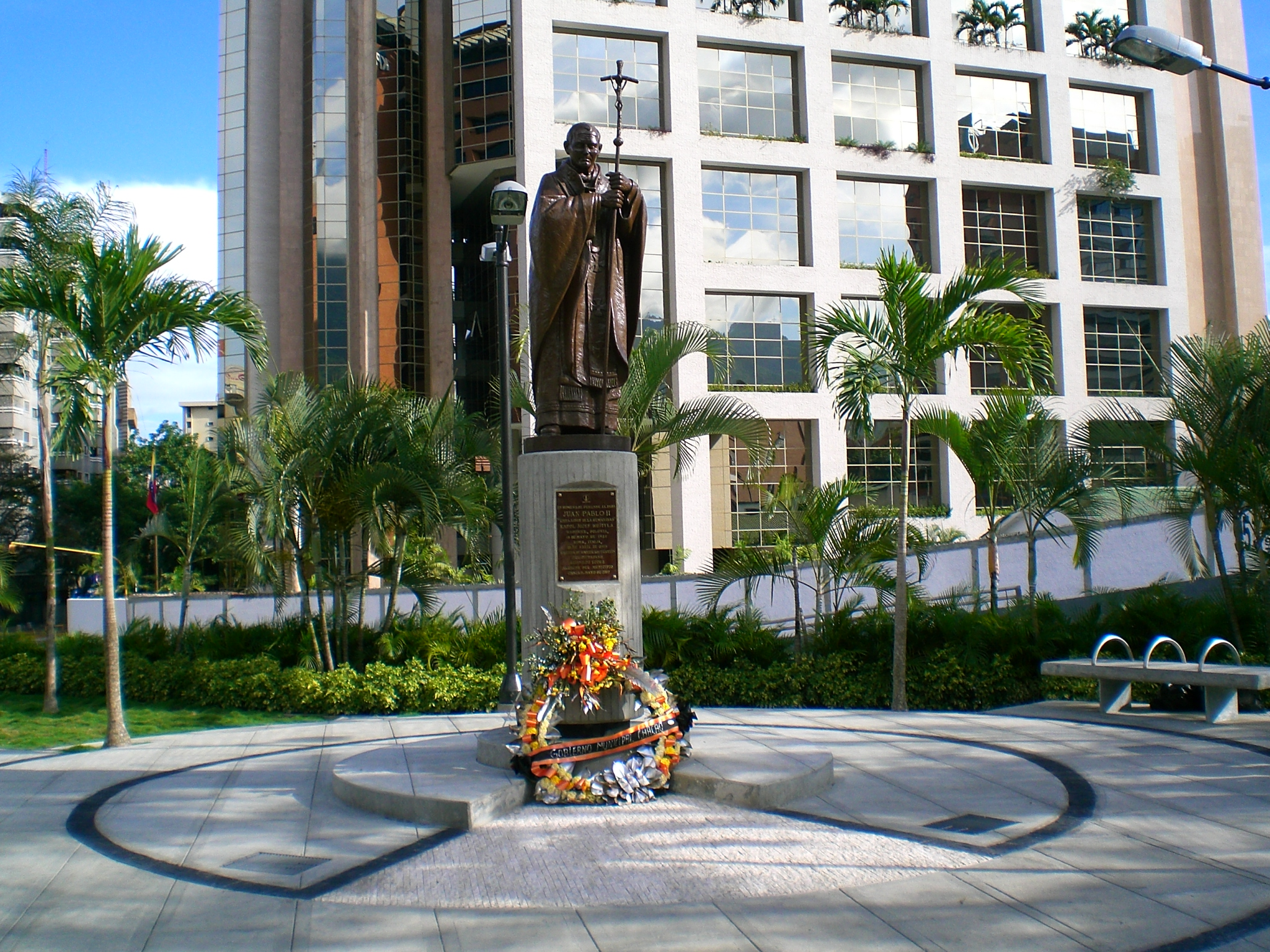 Plaza Juan Pablo II, Caracas, Venezuela